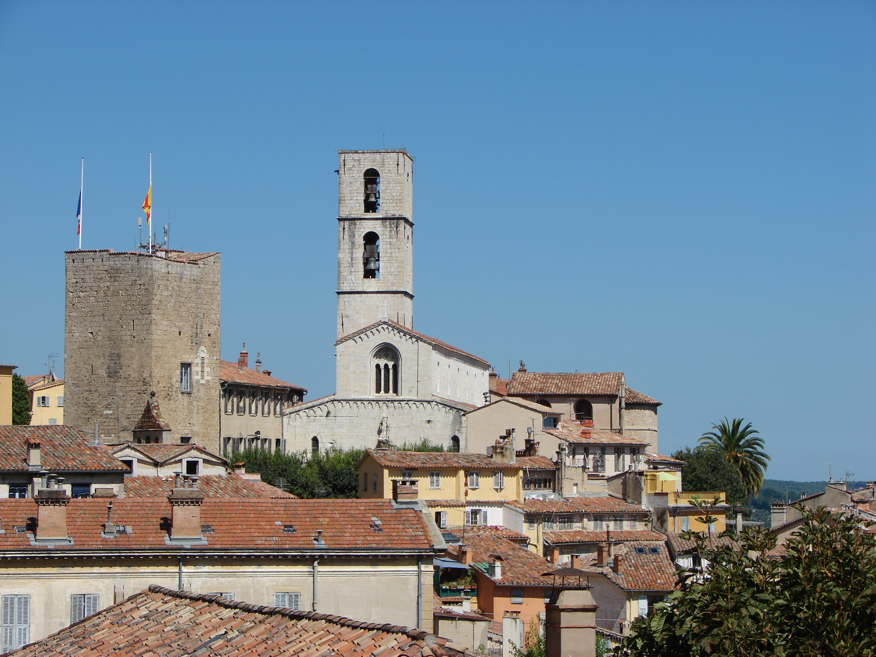 Vue de la vieille ville de Grasse avec son Donjon et sa cathédrale